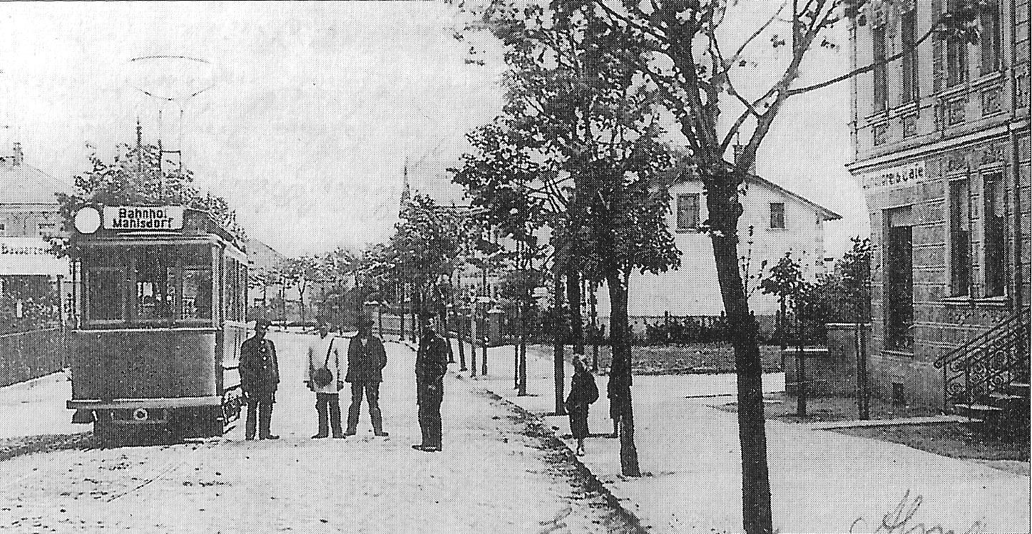 Wagen 3 der Städtischen Straßenbahn Cöpenick in der Bahnhofstraße in Mahlsdorf